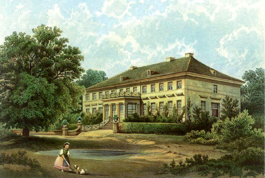 Rittergut Bornzin, Kreis Stolp, Provinz Pommern